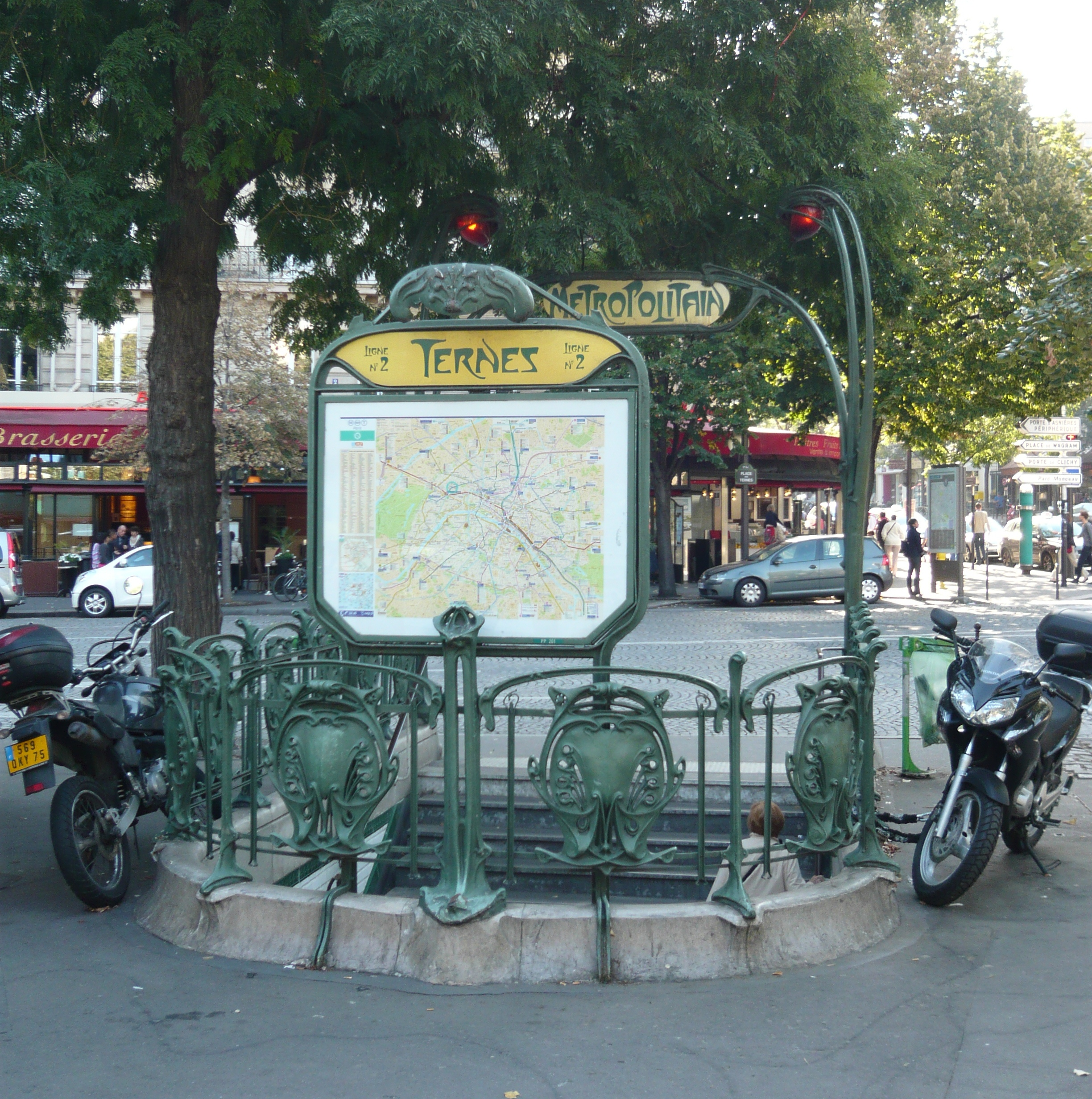 Edicule Guimard Métro Ternes